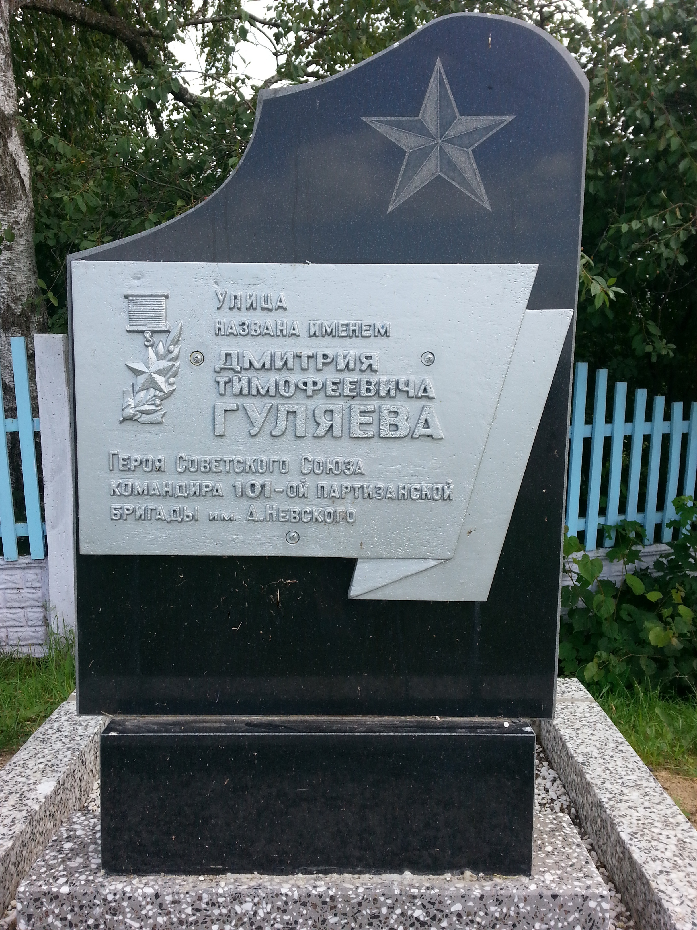 Памятная плита